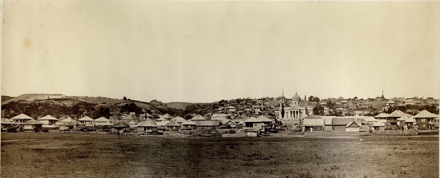 станица Цимлянская (ныне город Цимлянск) Ростовская область